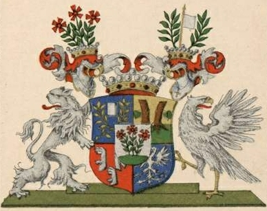 Nolckeni suguvõsa vabahärravapp